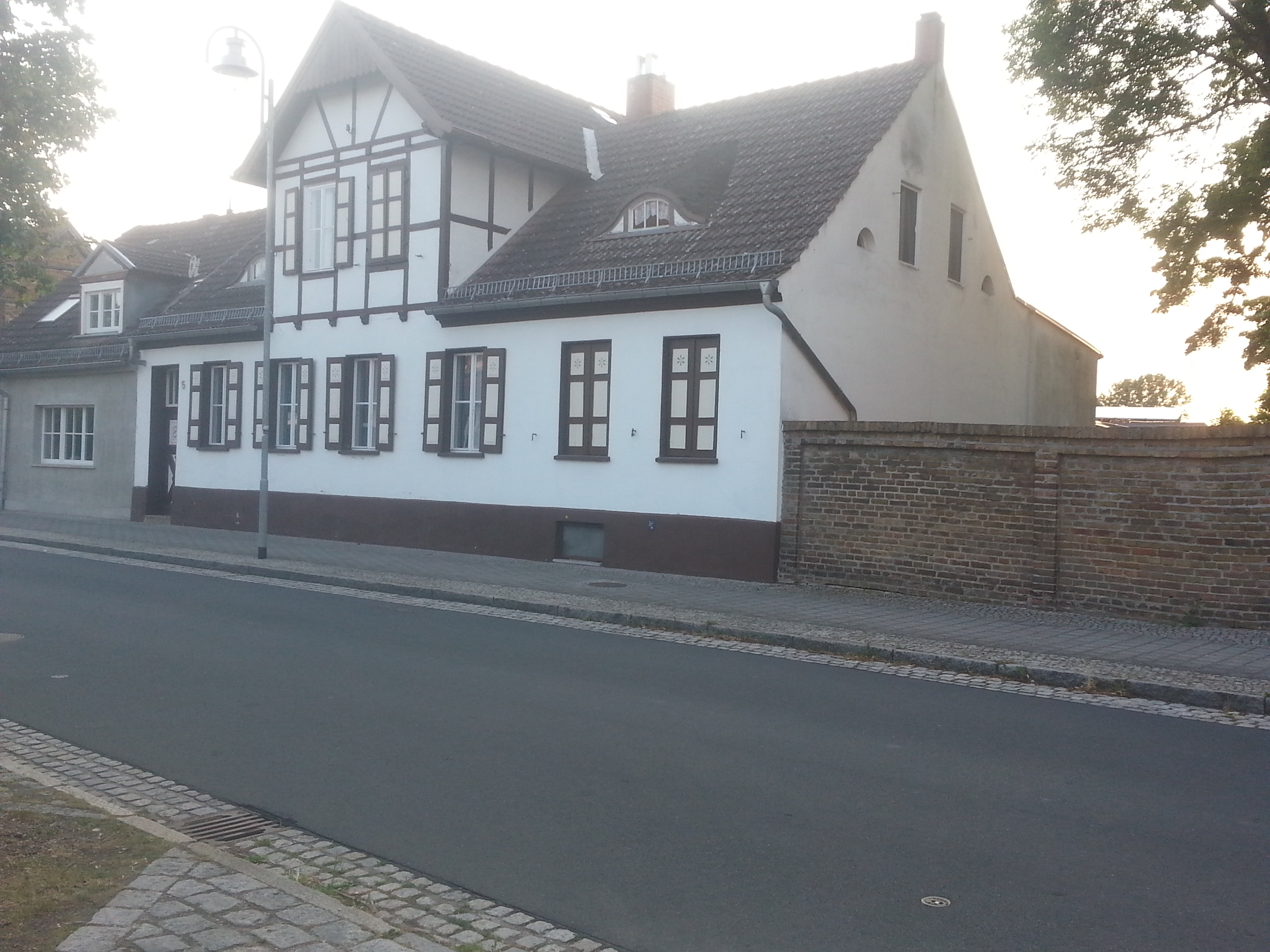 Denkmalgeschütztes Wohnhaus in Trebbin Luckenwalder Straße 5